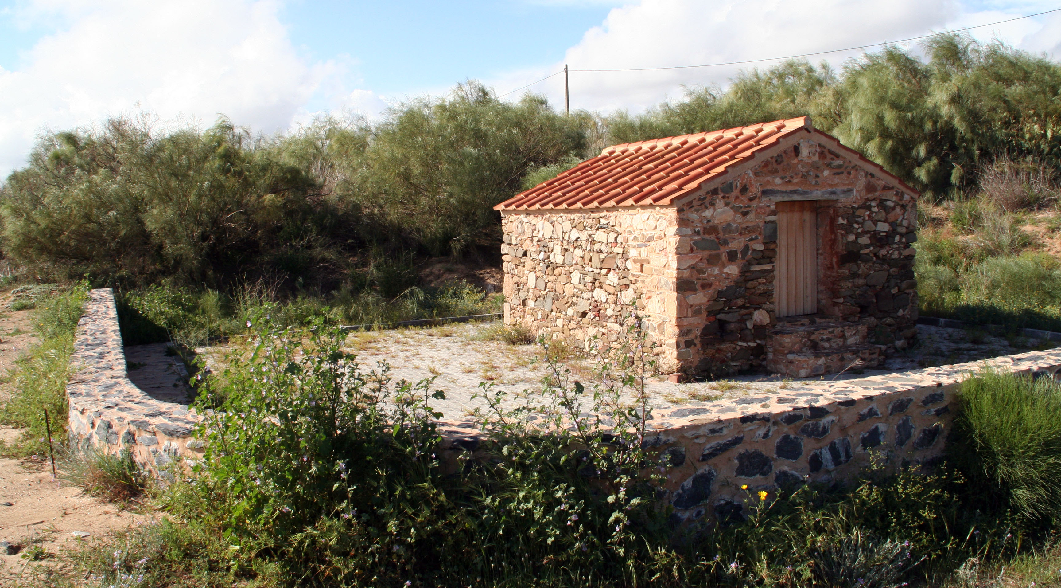 Mausoleo romano de Isla Canela. Punta del Moral. Ayamonte.